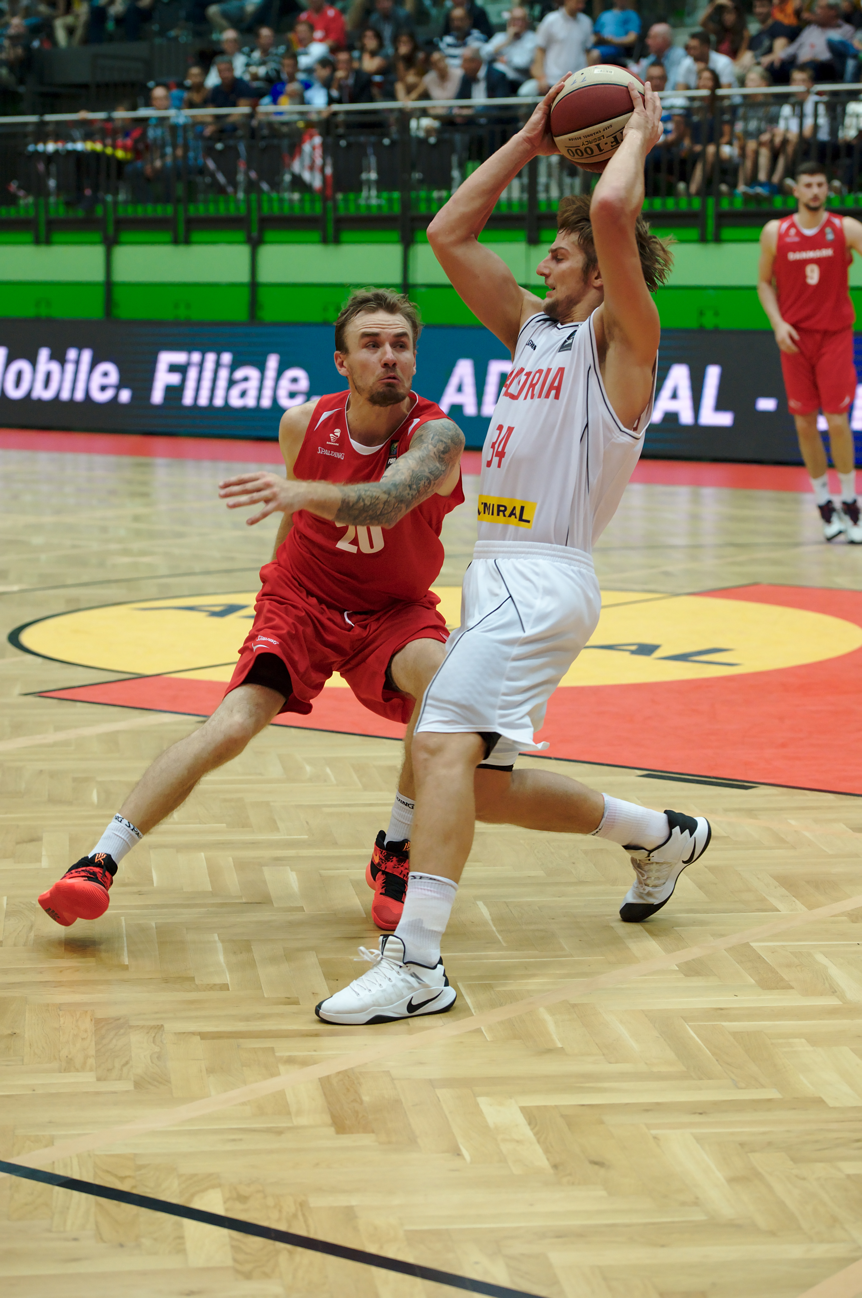 FIBA-Basketball EM-Qualifikation am 7.9.2016 im Multiversum in Schwechat, Österreich - Dänemark. Bild zeigt Alan Voskuil (DEN) und Moritz Lanegger (AUT).